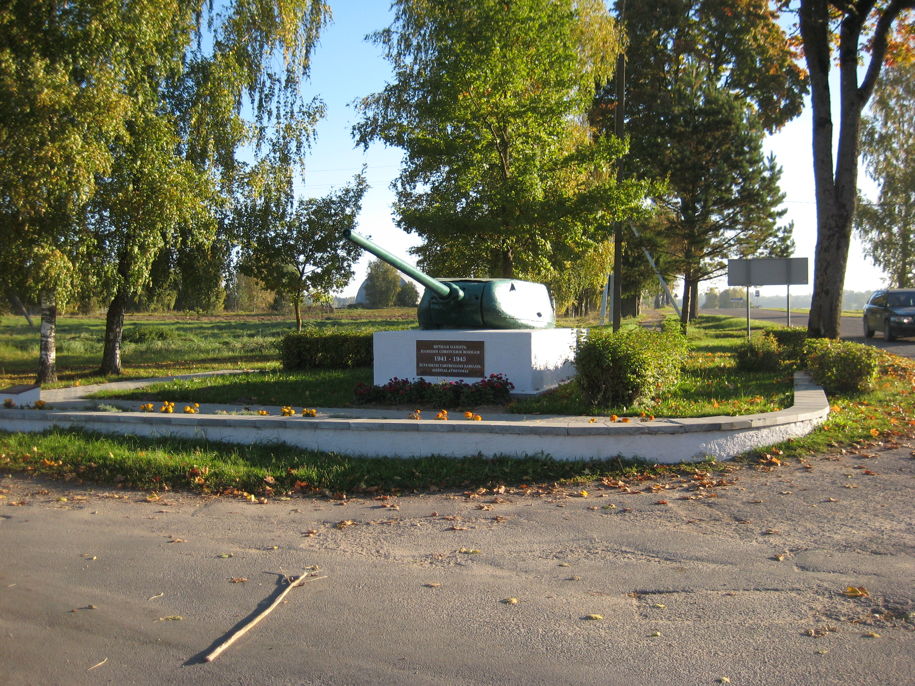 Dirvonėnai, Lithuania